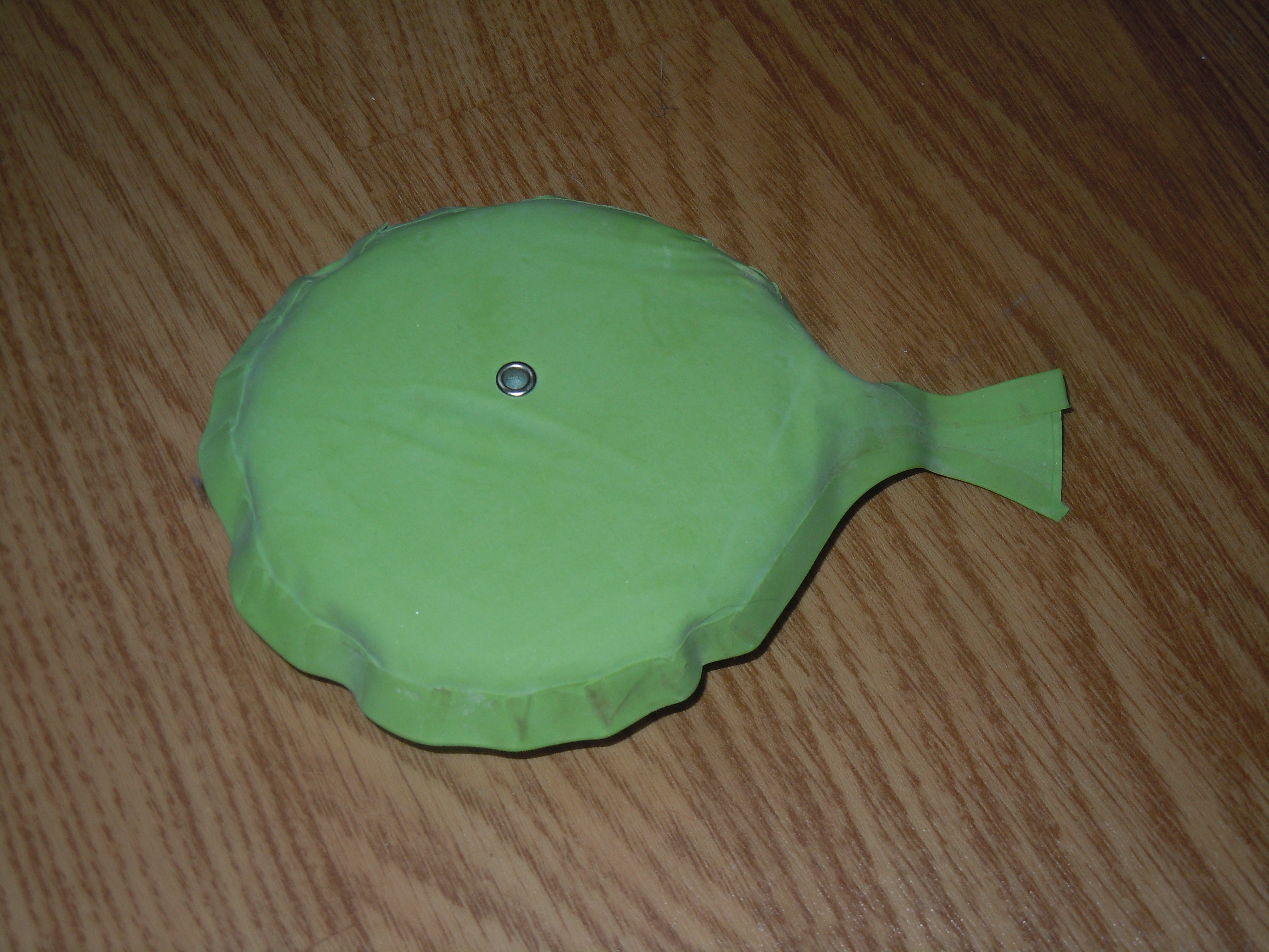 En grön "avancerad" pruttkudde av gummi.